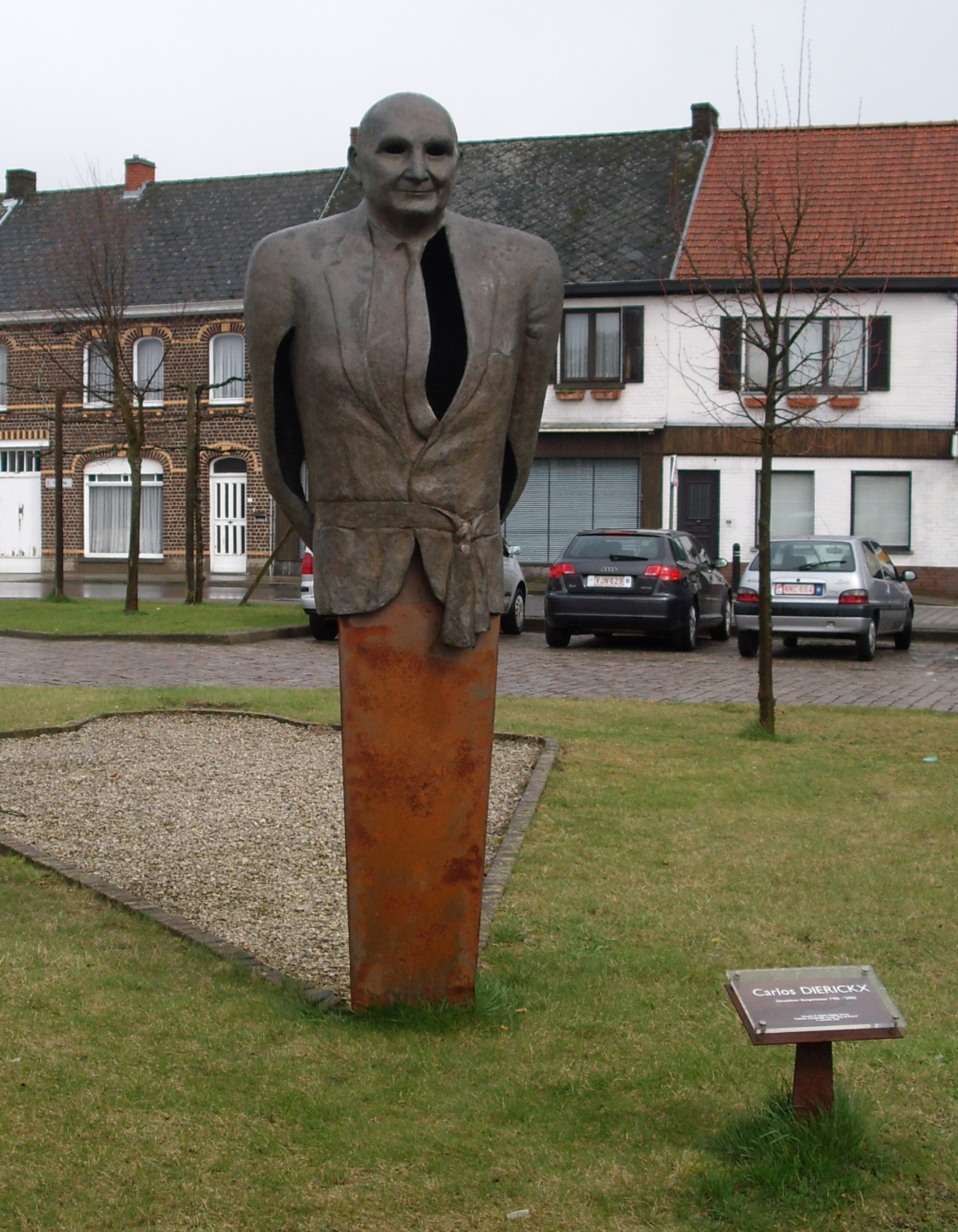 Standbeeld van de geneesheer-burgemeester Carlos Dierickx (1916-2003) - burgemeester van Asper en later van Gavere. Locatie: Carlos Dierickxplein - Asper - Gavere - Oost-Vlaanderen - Vlaanderen - België.